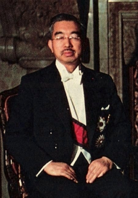 朝見の儀を終えた、皇太子明仁親王と皇太子妃美智子、および昭和天皇・香淳皇后